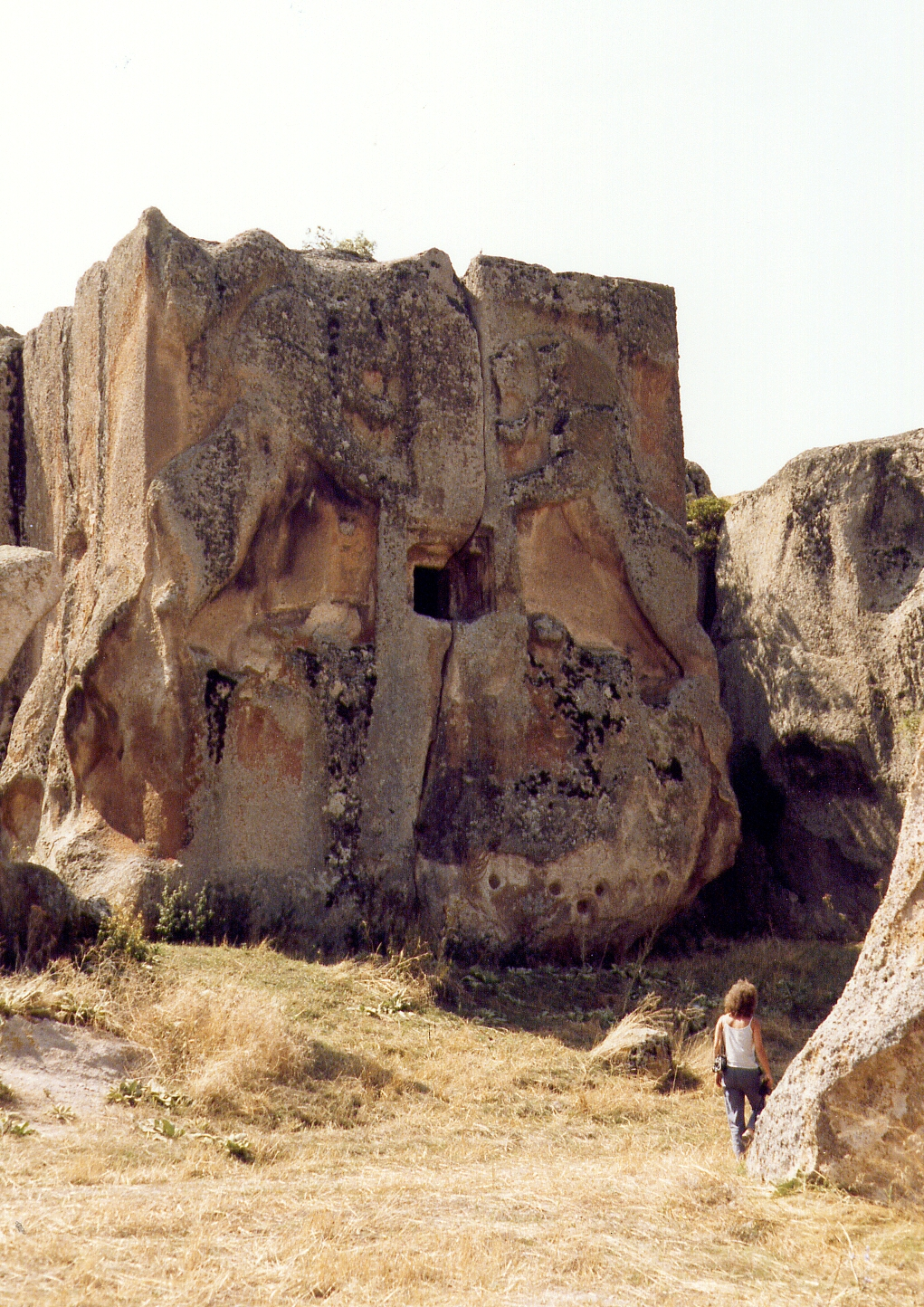 Arslantaş, phrygisches Felskammergrab bei Afyon, Türkei